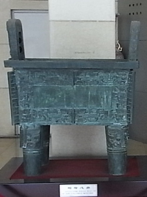 圖為真實比例仿製品。真品現藏於中國歷史博物館。